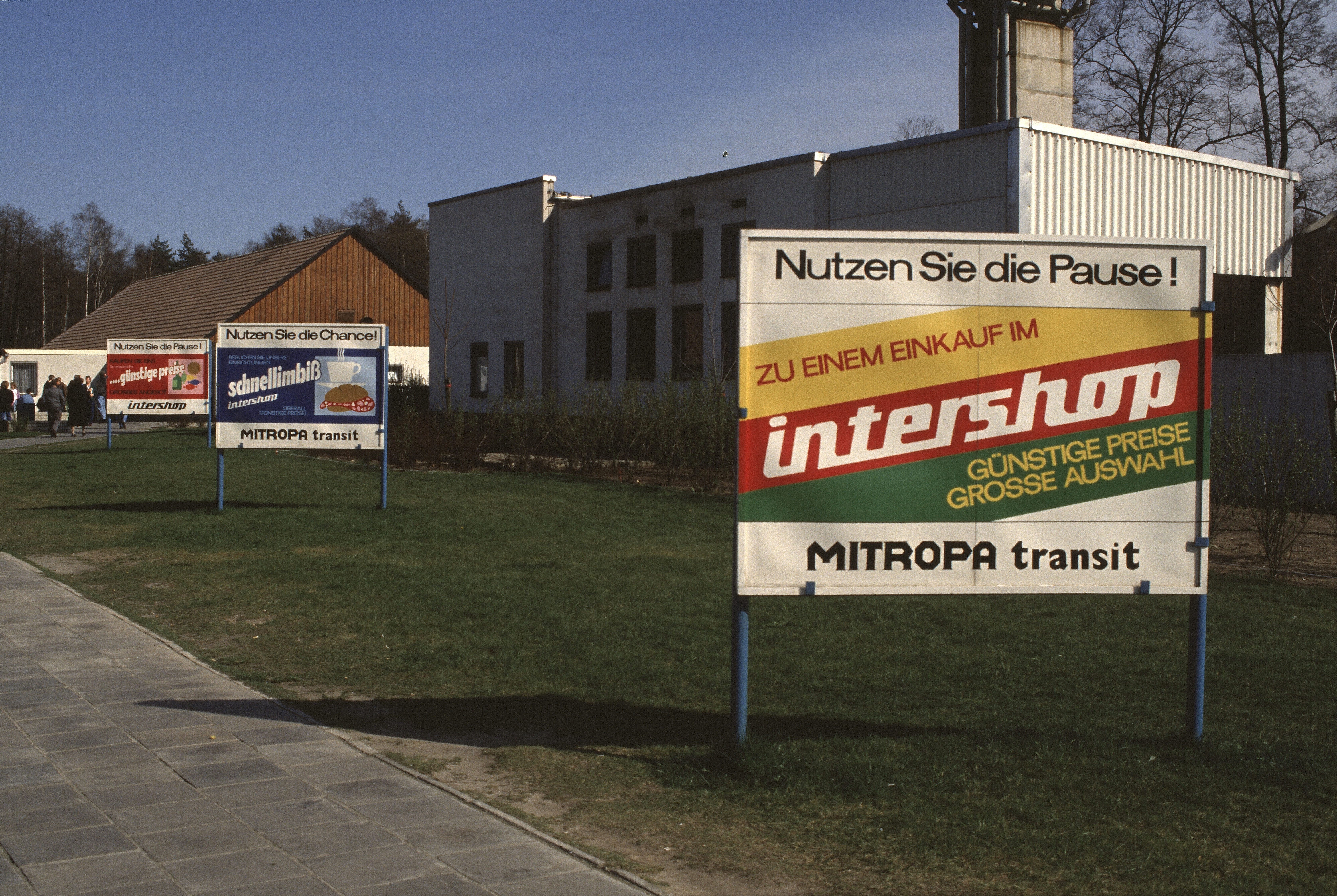 Werbeschilder für Mitropa Imbiss und Intershop am Rastplatz Theeßen der Transitstrecke durch die DDR